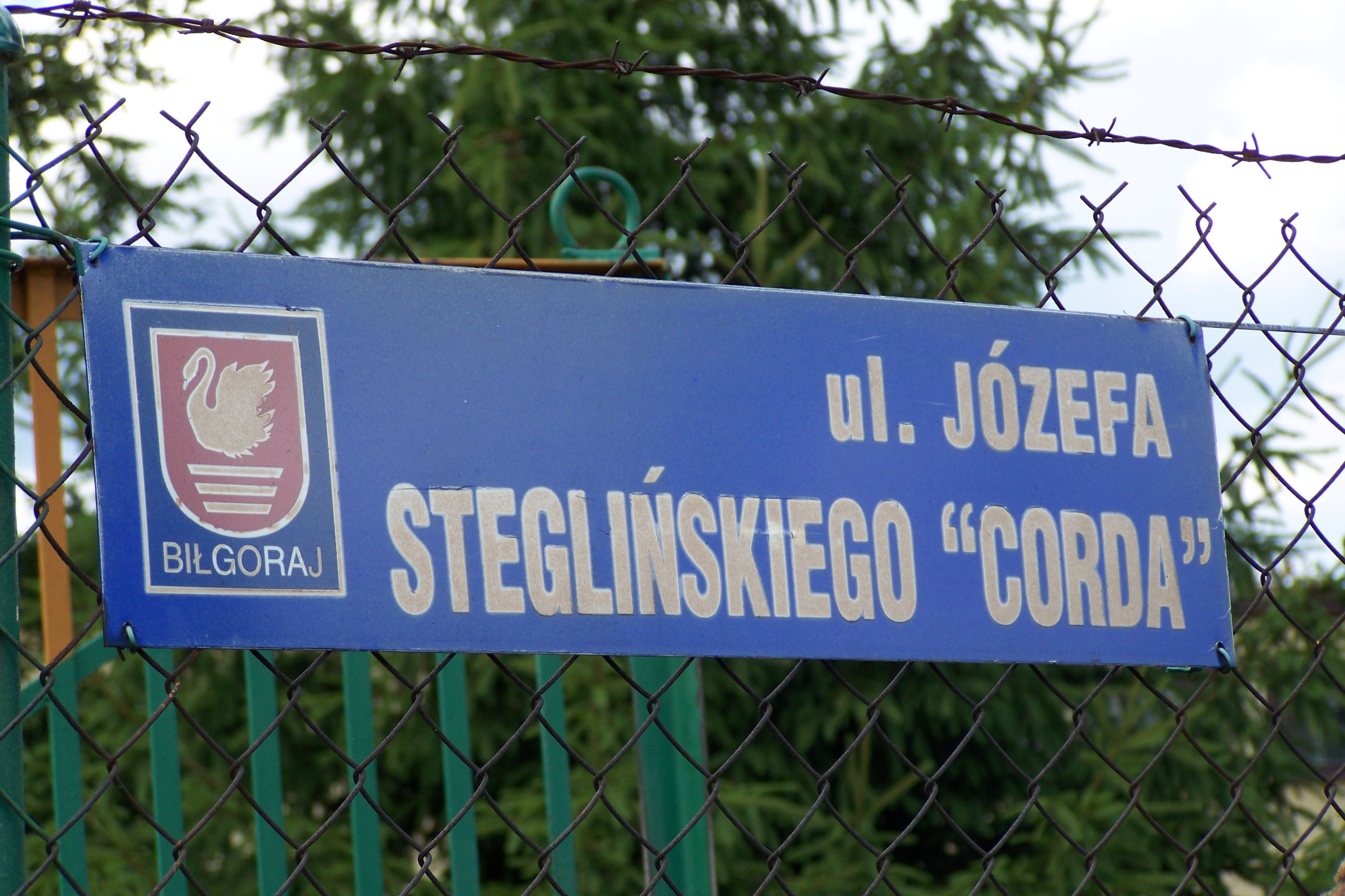 Tablica informacyjna z nazwą ulicy Józefa Steglińskiego.